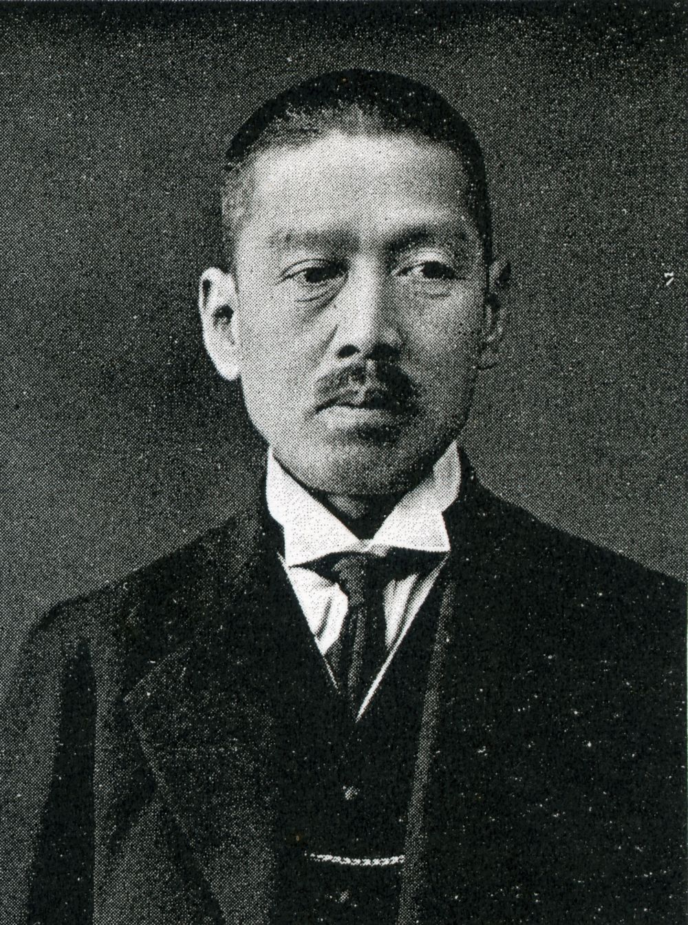 この写真は、小西和（1873-1947）の写真です。